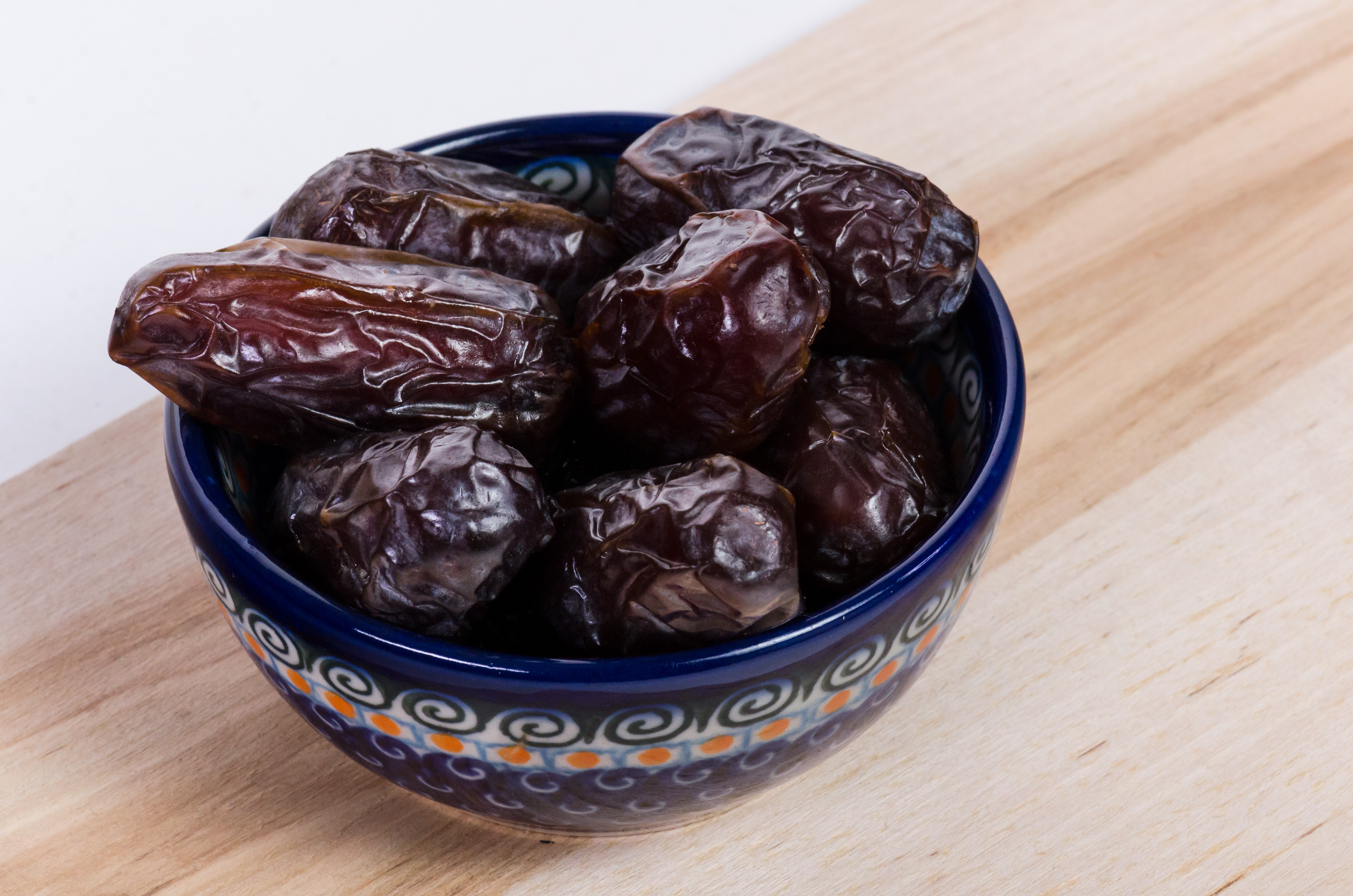 DATES MEDJOOL